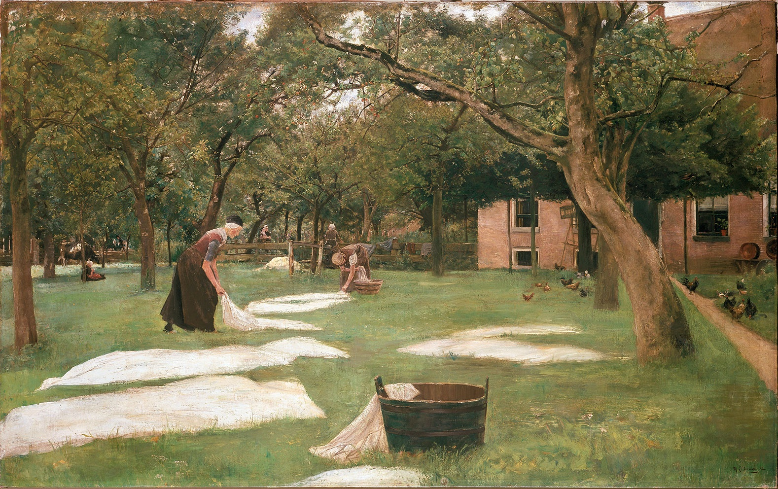 Darstellung der Herberge von Jan und Lammechien Mensel, Haus, Zweeloo